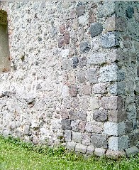 Südostecke. Dorfkirche Grüssow, Landkreis Mecklenburgische Seenplatte